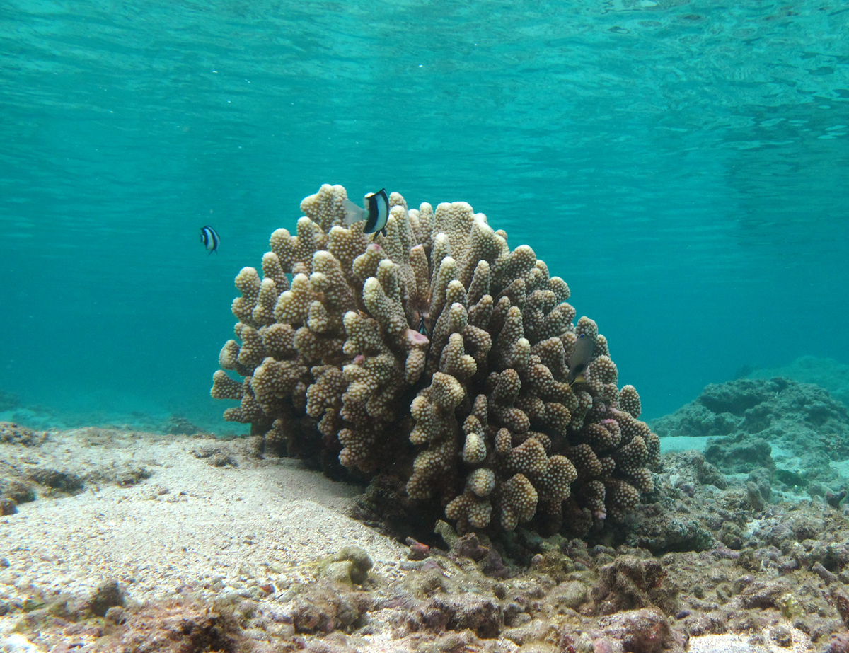 Corail Pocillopora grandis à la Réunion.